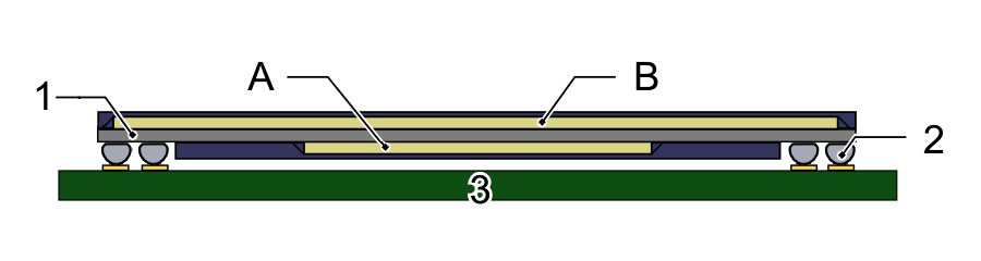 PiPパッケージの説明図